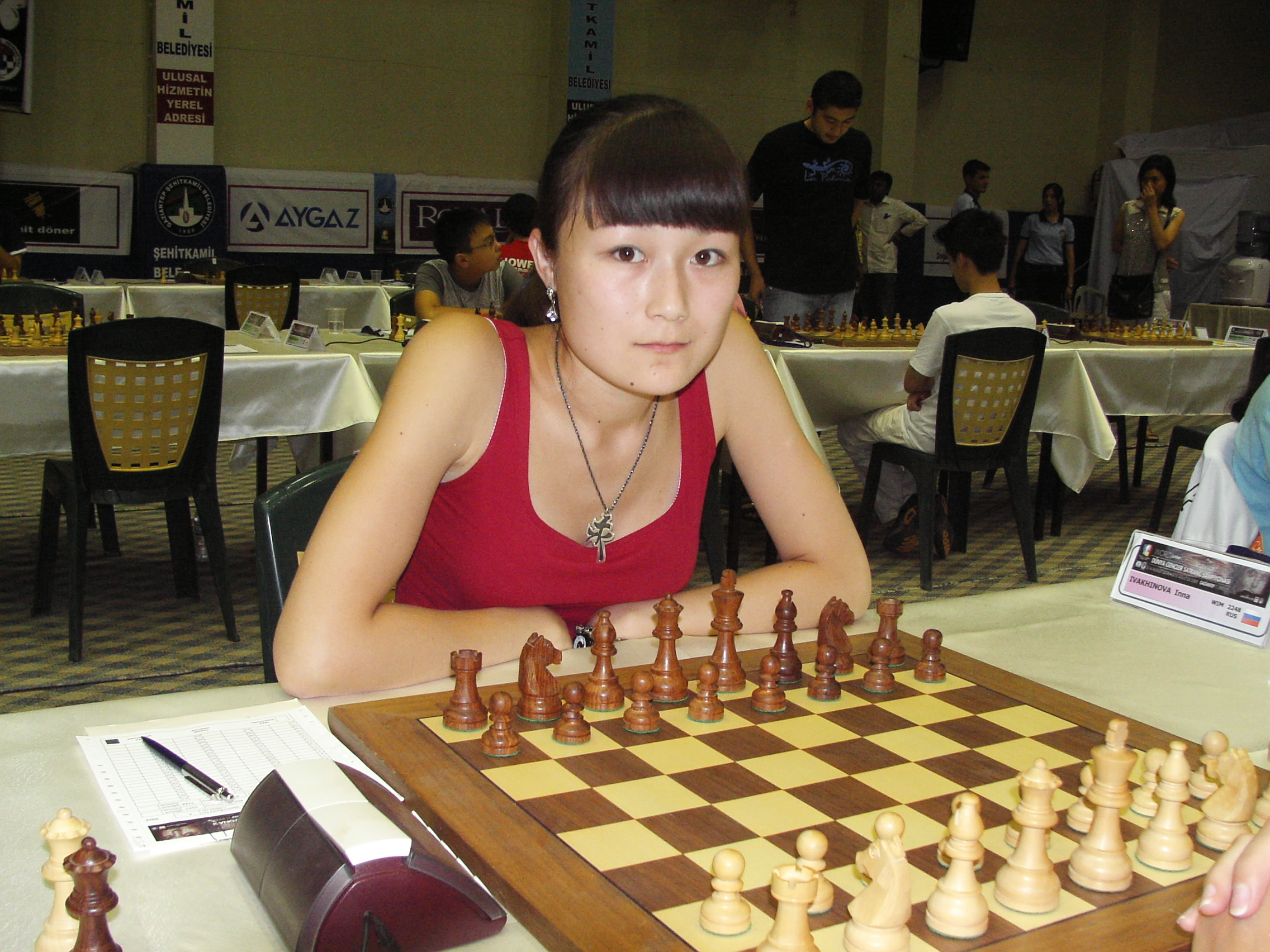 Photo of I. Ivakhinova